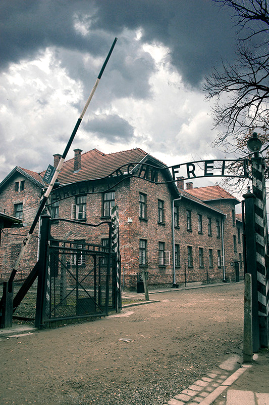 Oświęcim, obóz koncentracyjny "Auschwitz-Birkenau", 1940-1945